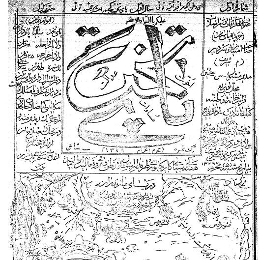 روزنامه پایتخت محرم 1329 (دی ماه 1289)